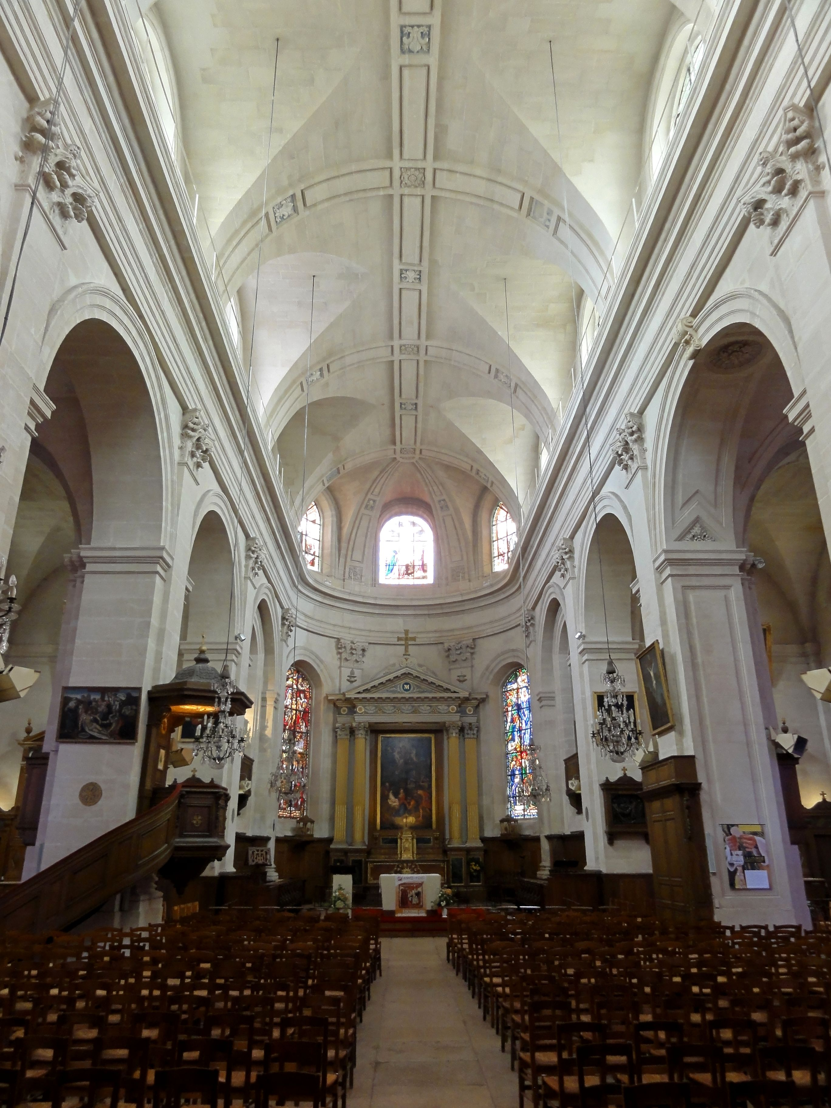 Nef, vue vers l'est.